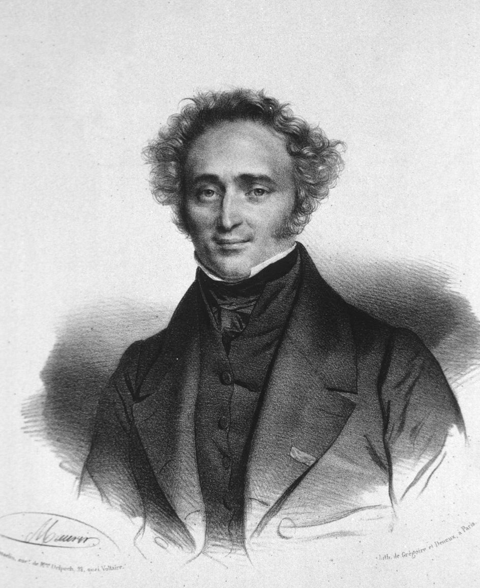 Le Docteur Jean Cruveilhier